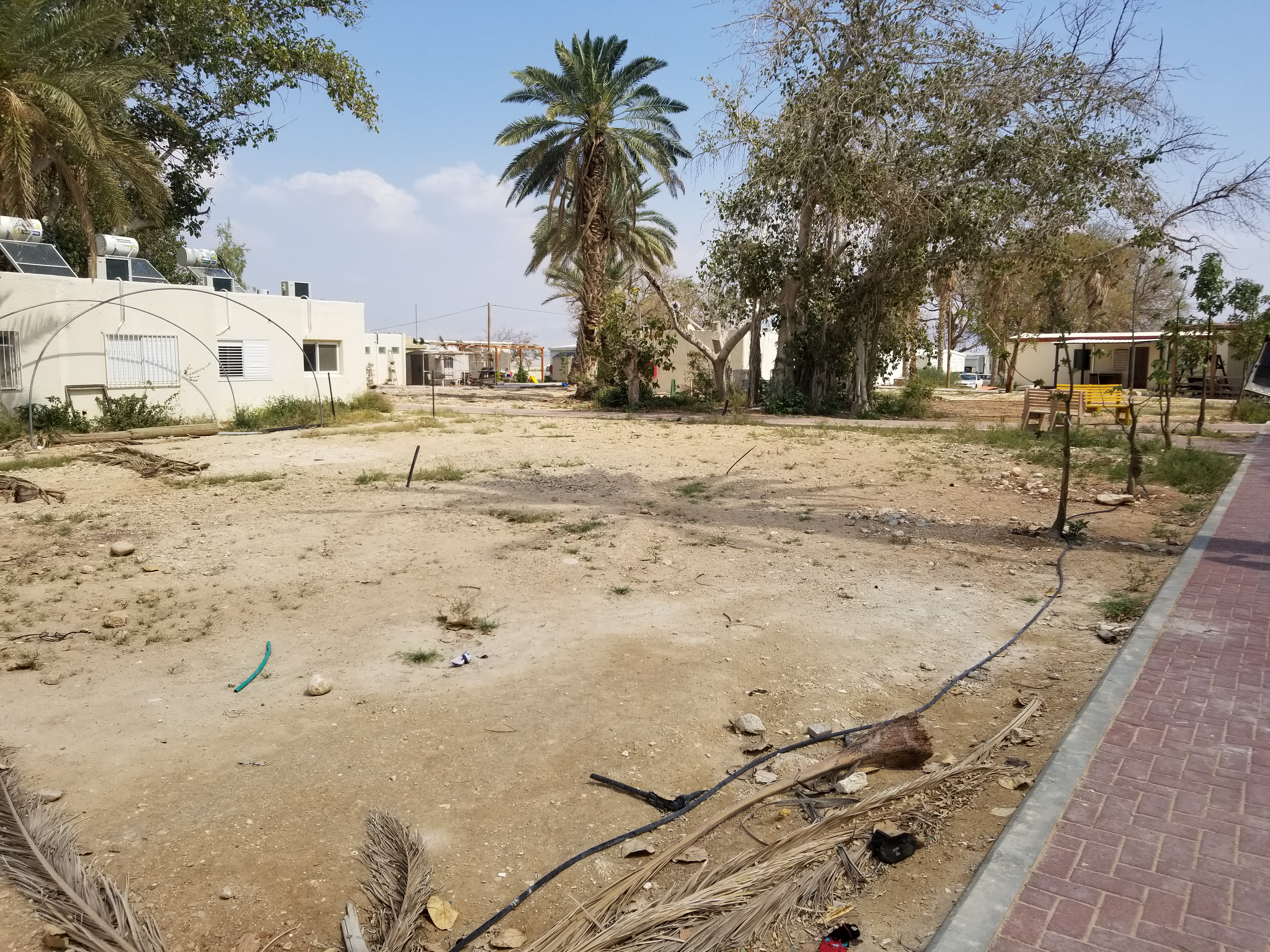 היישוב קדם ערבה.